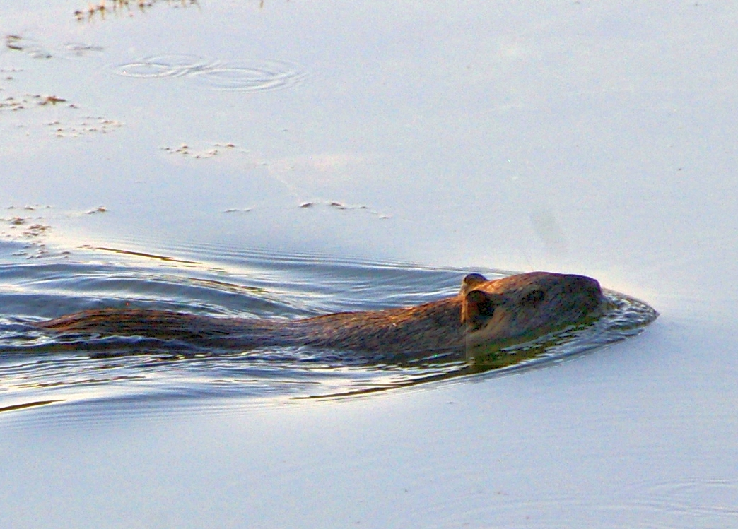 Собствена творба от септември 2016 край село Дичин, Търновско